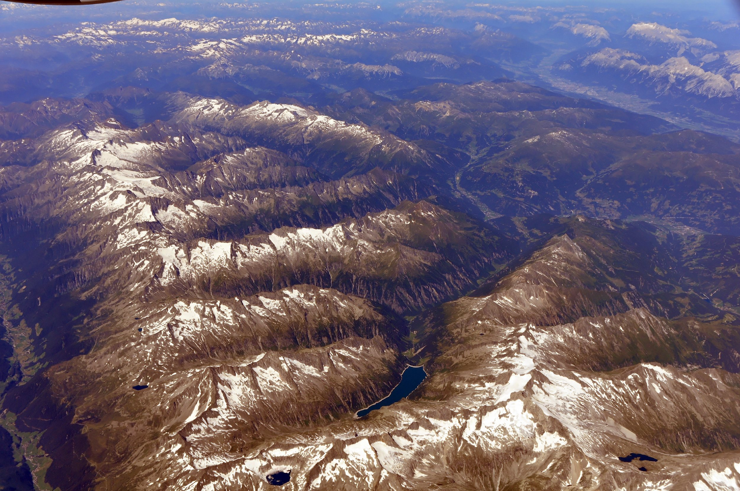 Bilder vom Flug Hannover Rom August 2014